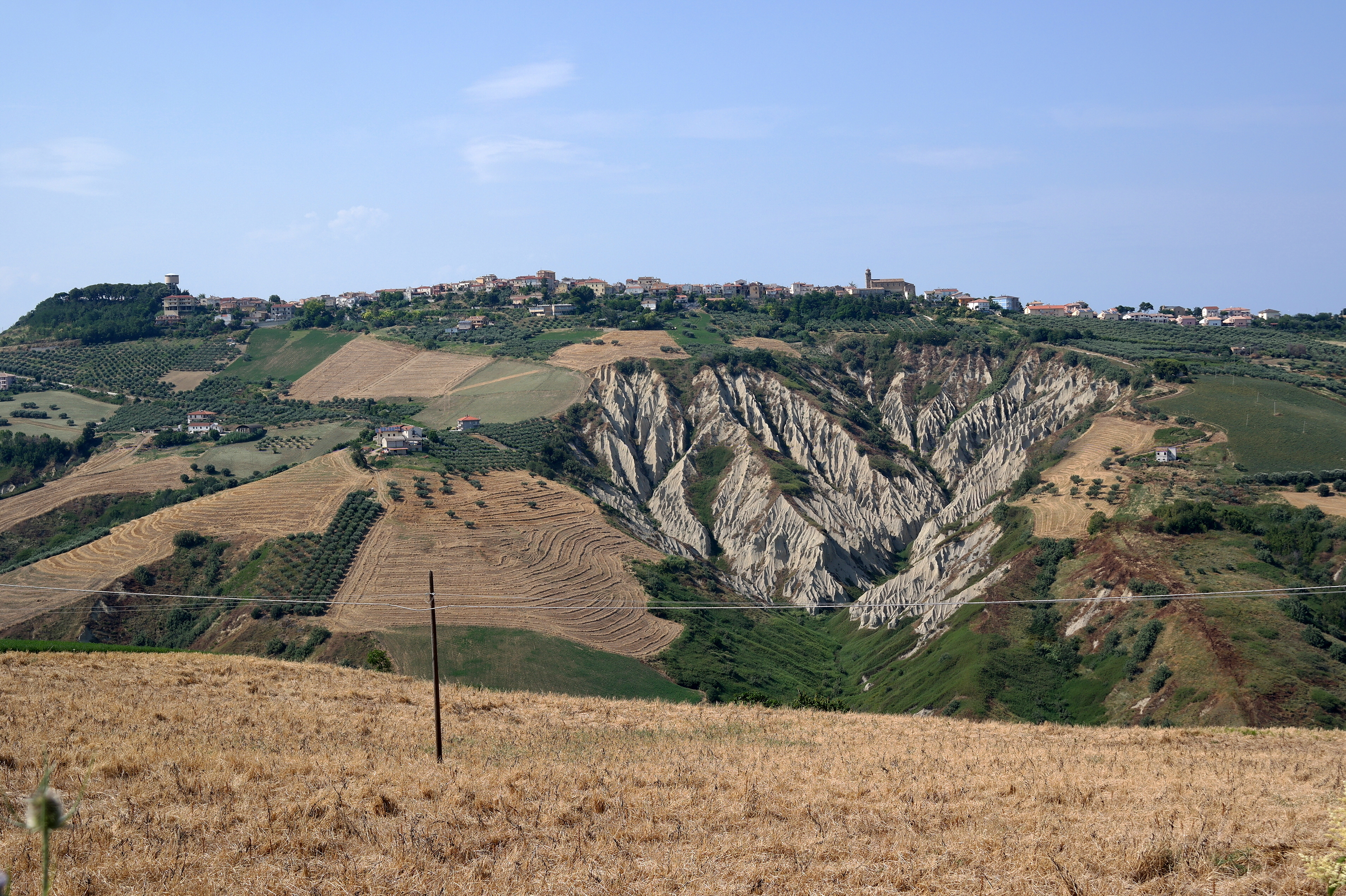 Calanchi presso Casoli d'Atri